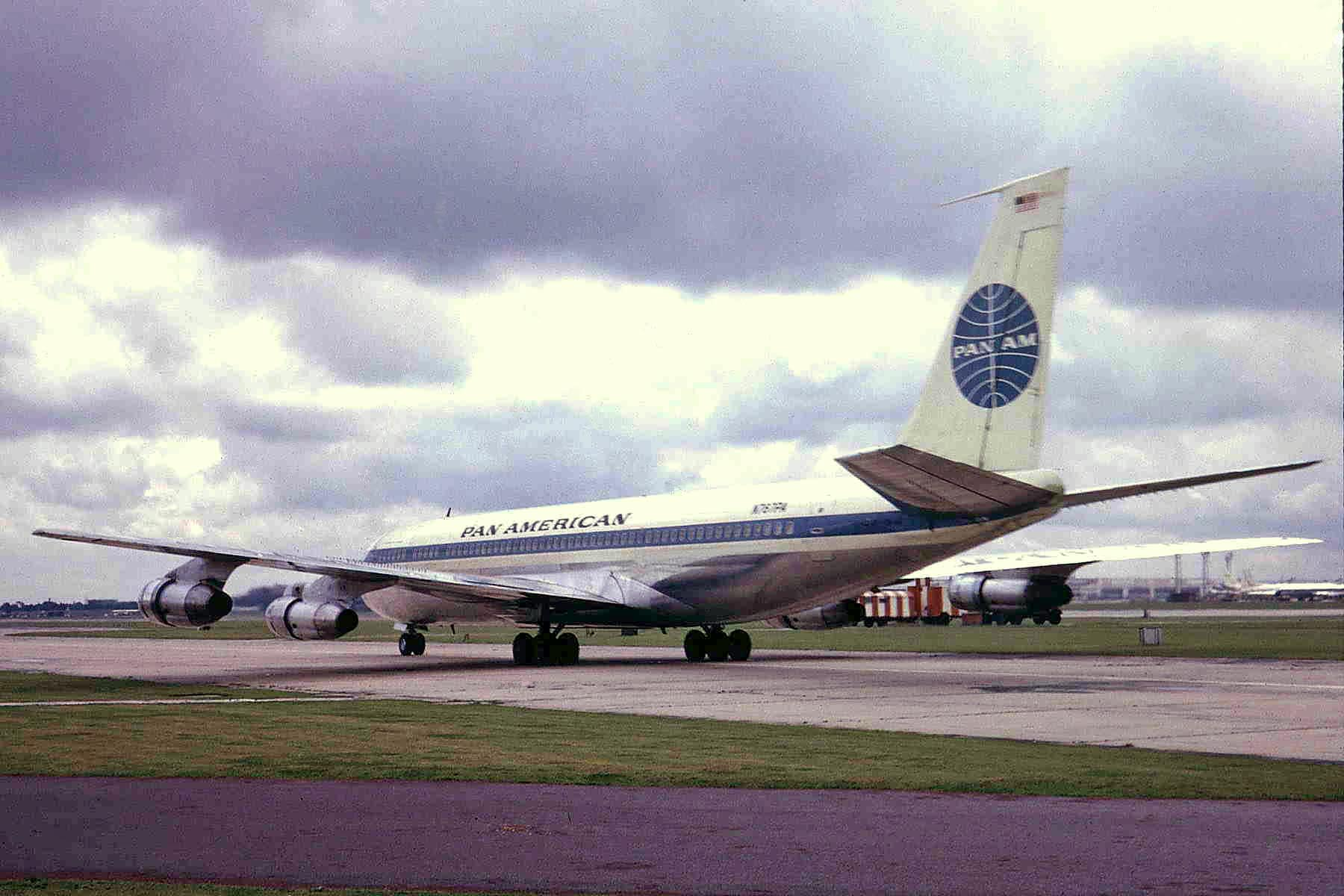 N767PA 2 B707-321C Pan Am 2 LHR